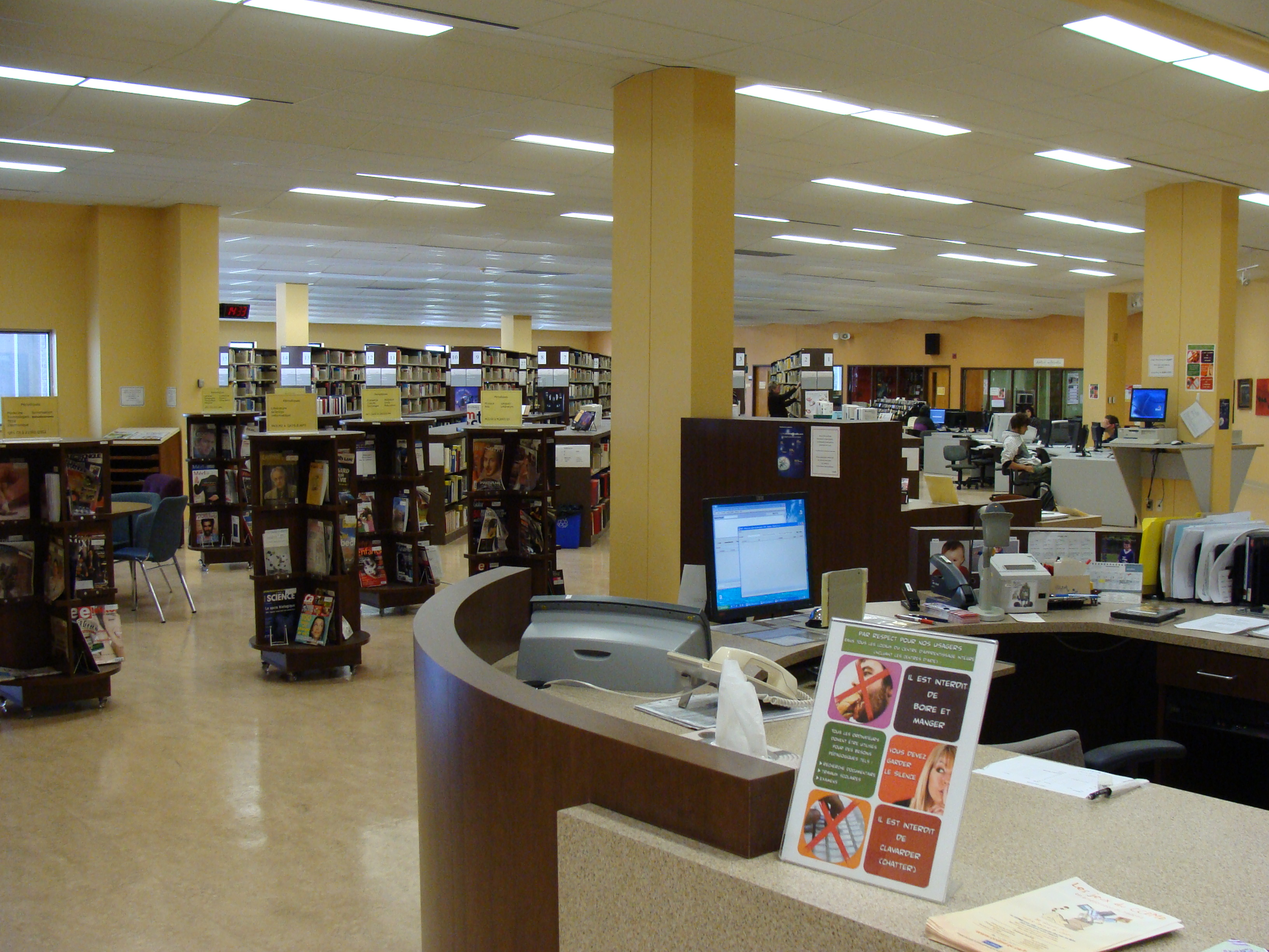 Bibliothèque du Cégep de Drummondville